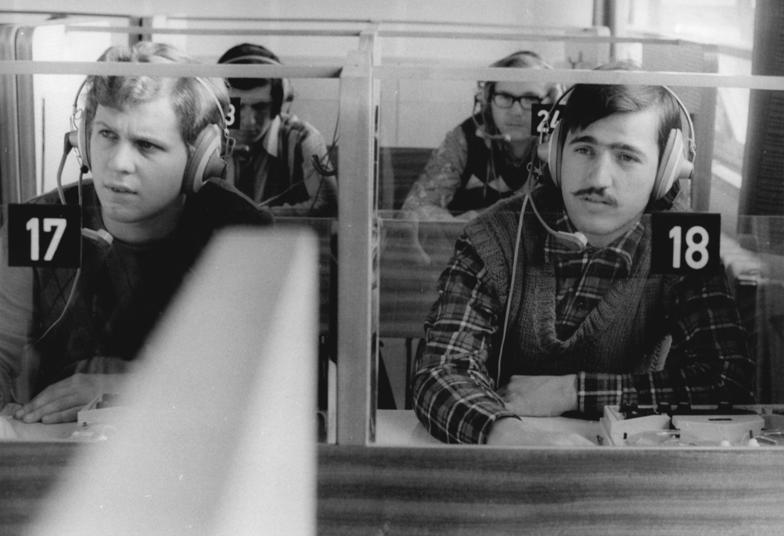 Langenstein, Russischunterricht für Lehrlinge ADN-ZB Katscherowski 22.4.75 Bez. Magdeburg: Facharbeiterausbildung in der BBS des VEG Saatzucht Langenstein. Das Studium der russischen Sprache im entsprechenden Fachkabinett gehört zum Ausbildungsprofil in diesem staatlich anerkannten Lehrbetrieb. Ulrich Giesecke (r) und Torsten Thiessenhusen stehen im dritten Lehrjahr für einen Berufsabschluß als Agrotechniker-Mechanisator. In diesem wichtigen Grundberuf werden sie als sozialistische Facharbeiterpersönlichkeiten bei der industriemäßigen Pflanzenproduktion mitwirken. vergl. dazu P0422-5+6N